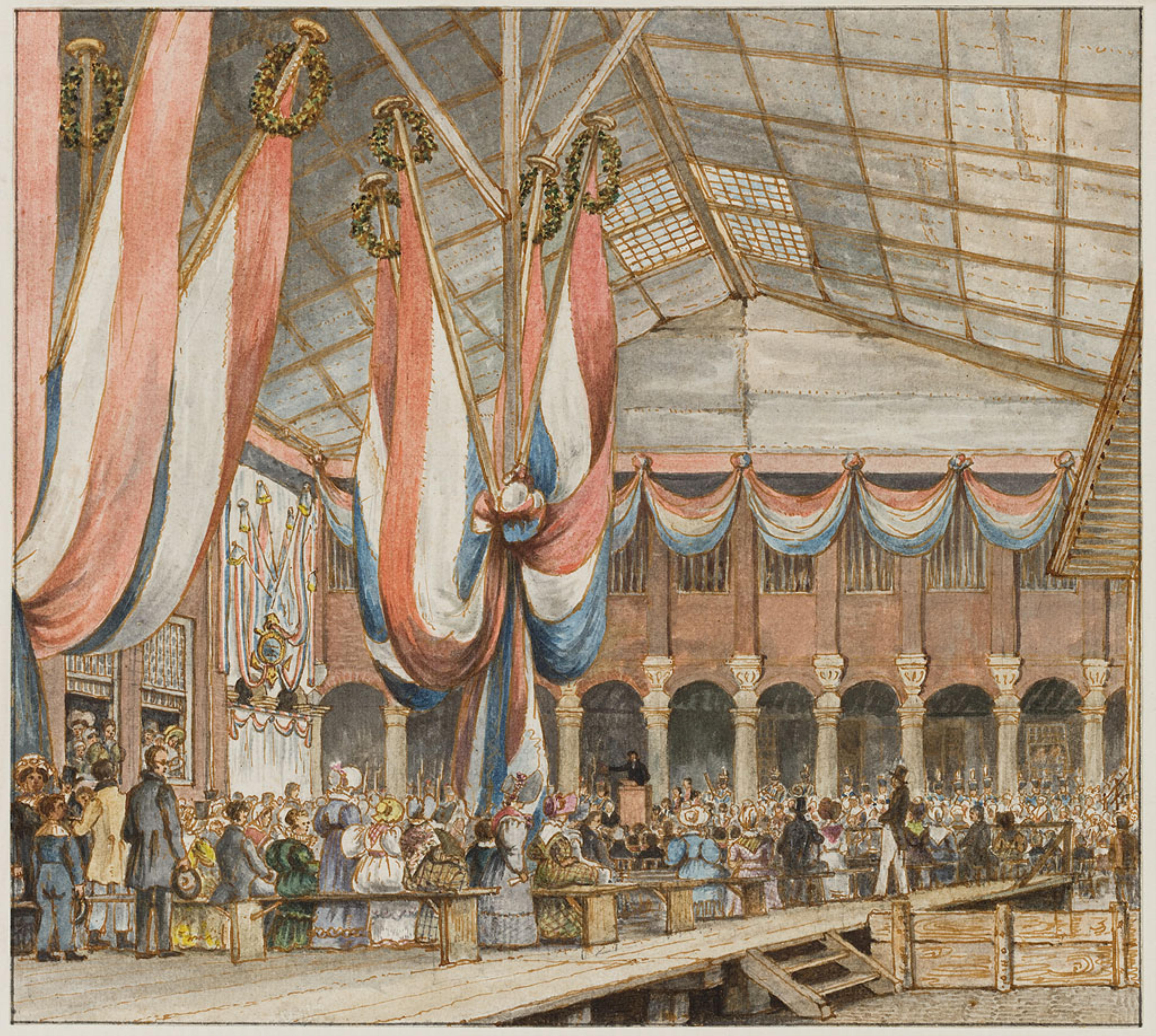 Onthulling van gedenksteen voor J.C.J. van Speyk (1802-1831) op 20 okt. 1831 in het Burgerweeshuis